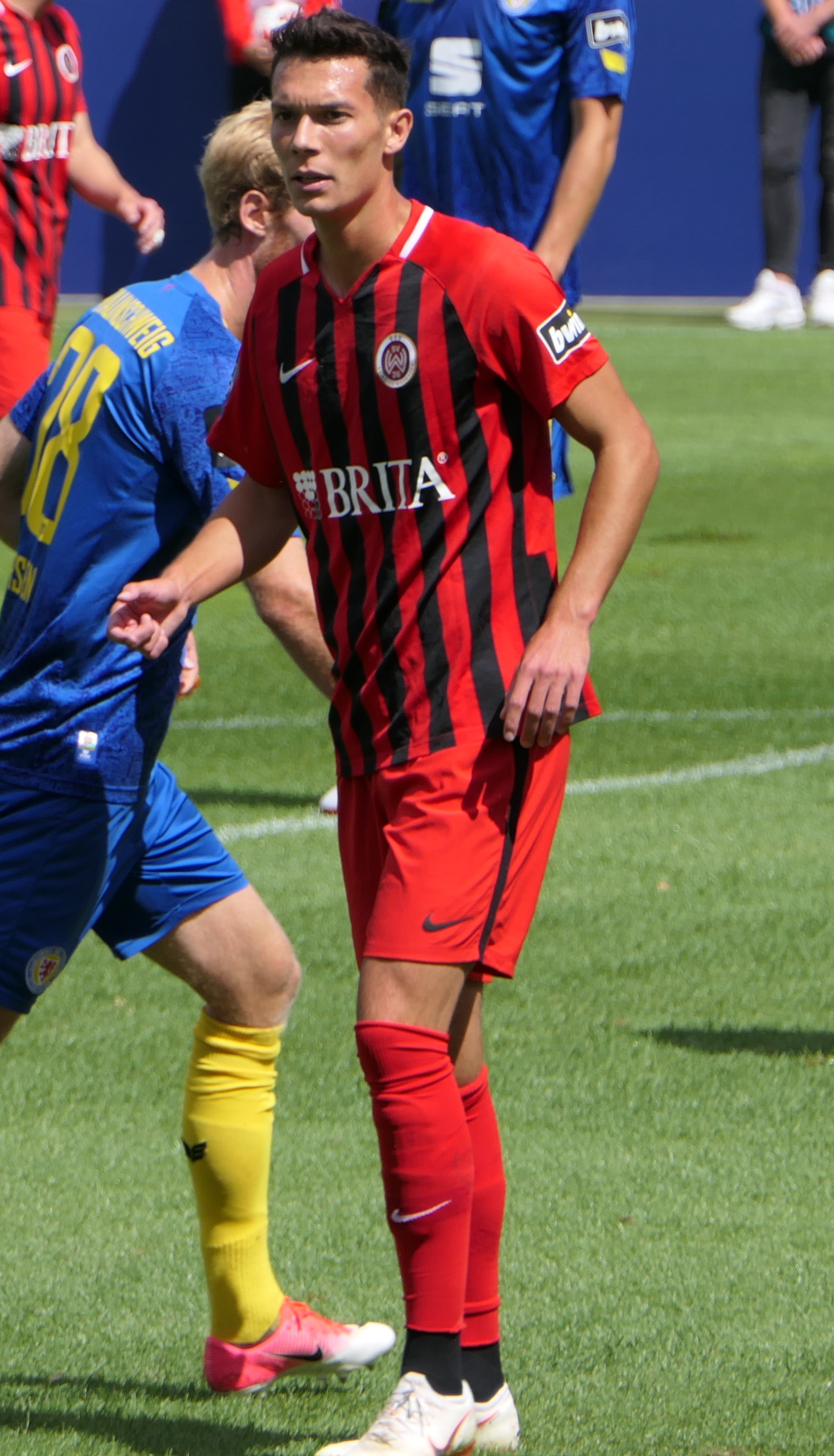 Der Fussballprofi Jeremias Lorch im Trikot von Wehen Wiesbaden beim Heimspiel gegen Eintracht Braunschweig am 11.08.2018.